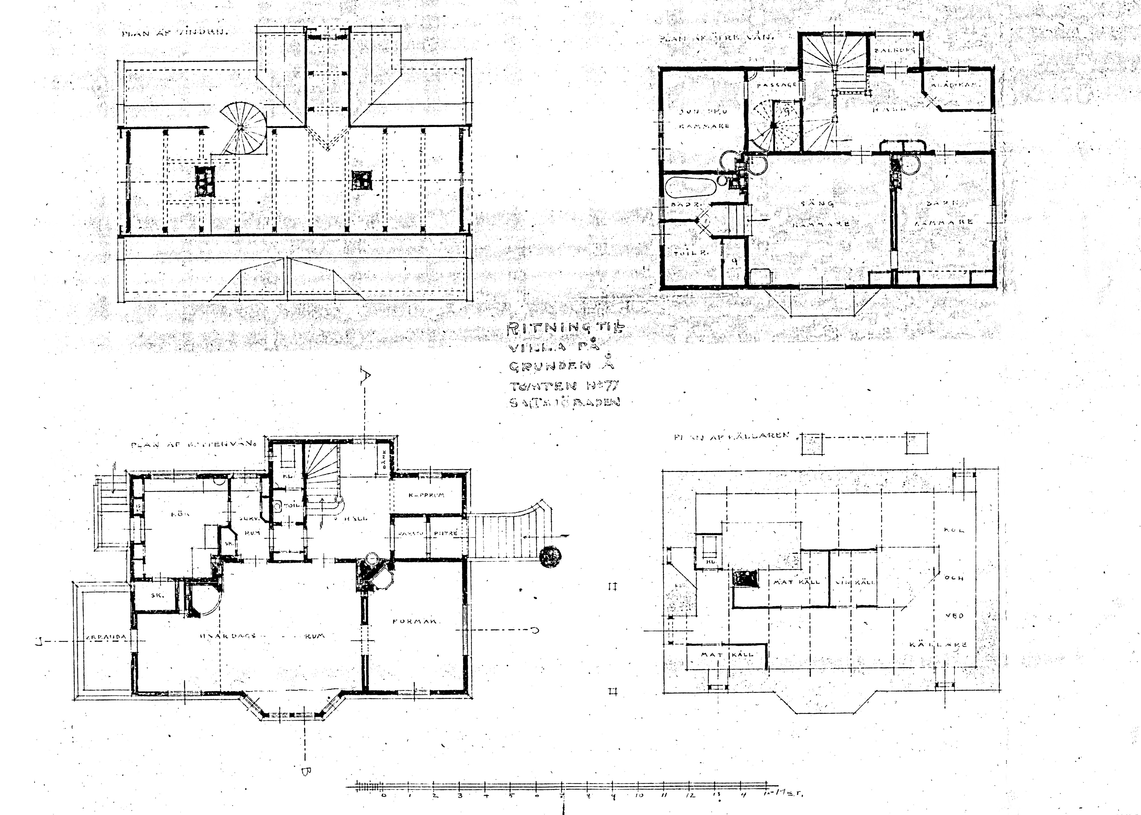 Thammska villan i Saltsjöbaden, bygglovsritningar